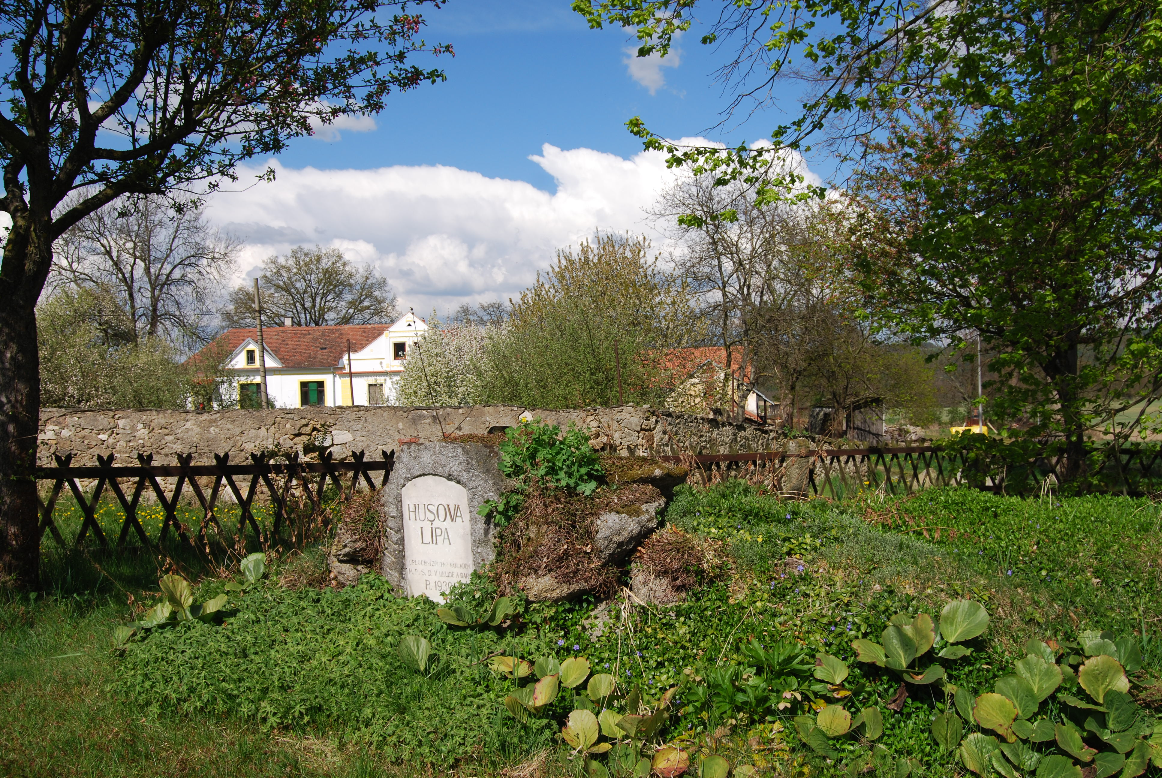 Torzo Husovy lípy. Úklid - část obce Nedrahovice v okrese Příbram. Česká republika.